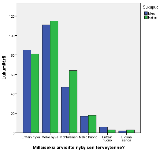 Pylväsdiagrammi